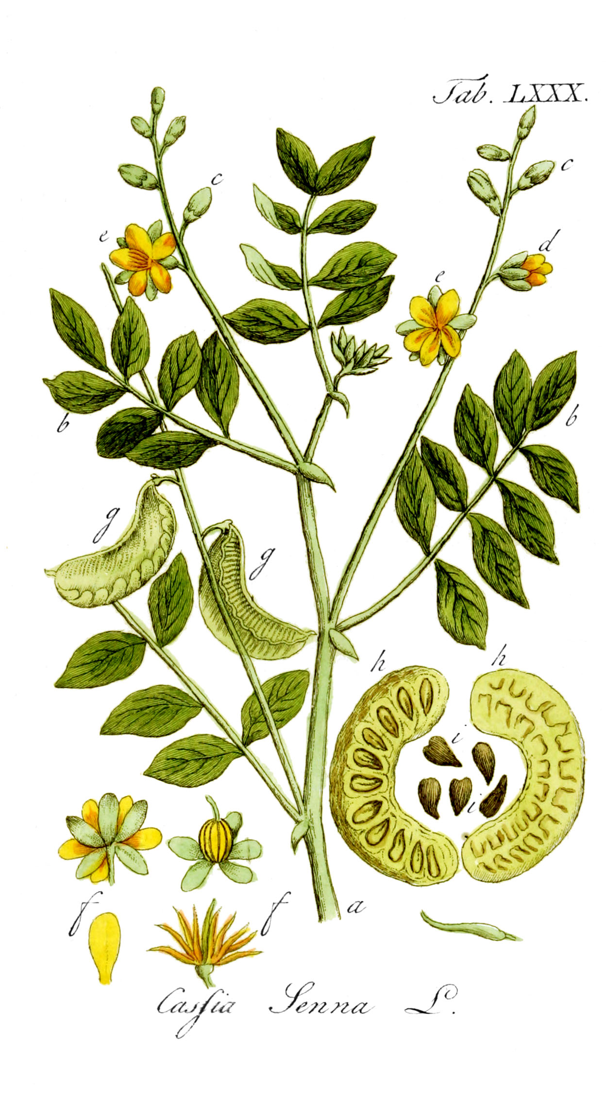 Senna alexandrina (= Cassia senna). Tab. 80